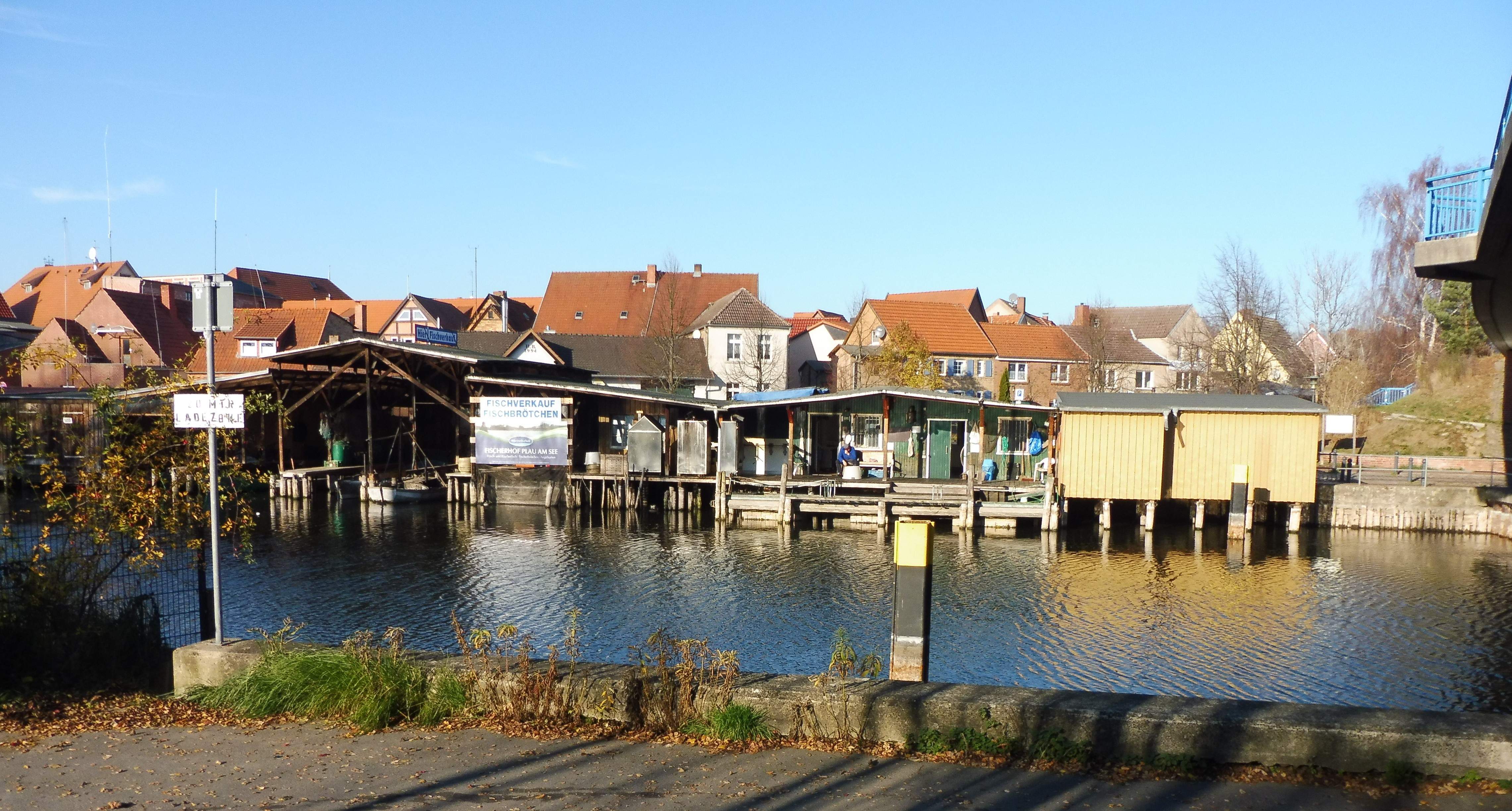 Fischerstation auf der Nordseite der Elde in Plau am See